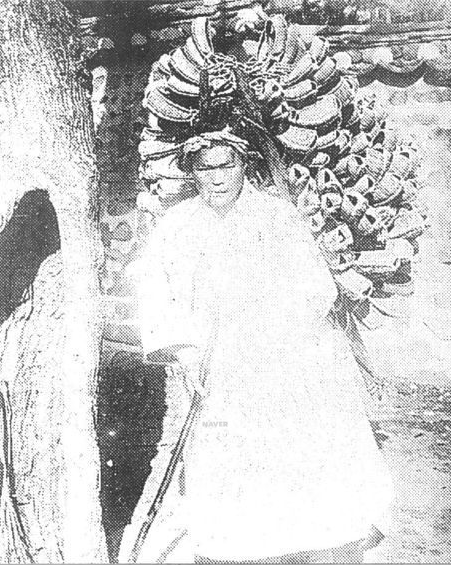 조선말: 조선 말기의 신발(짚신) 상인으로, 짚신 행상이다.